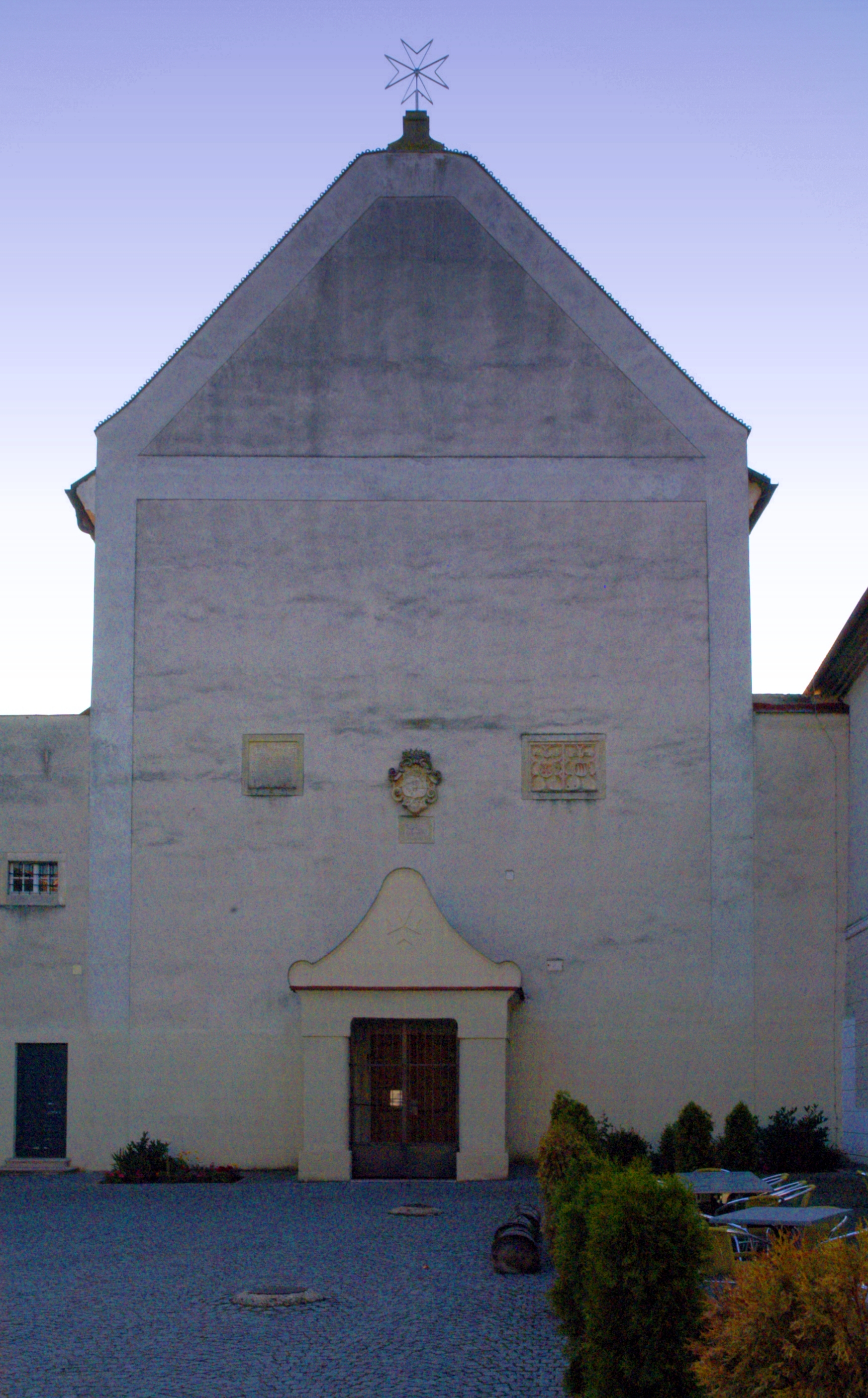 Katholische Pfarrkirche, Schlosskirche heiliger Johannes der Täufer im Schloss Mailberg